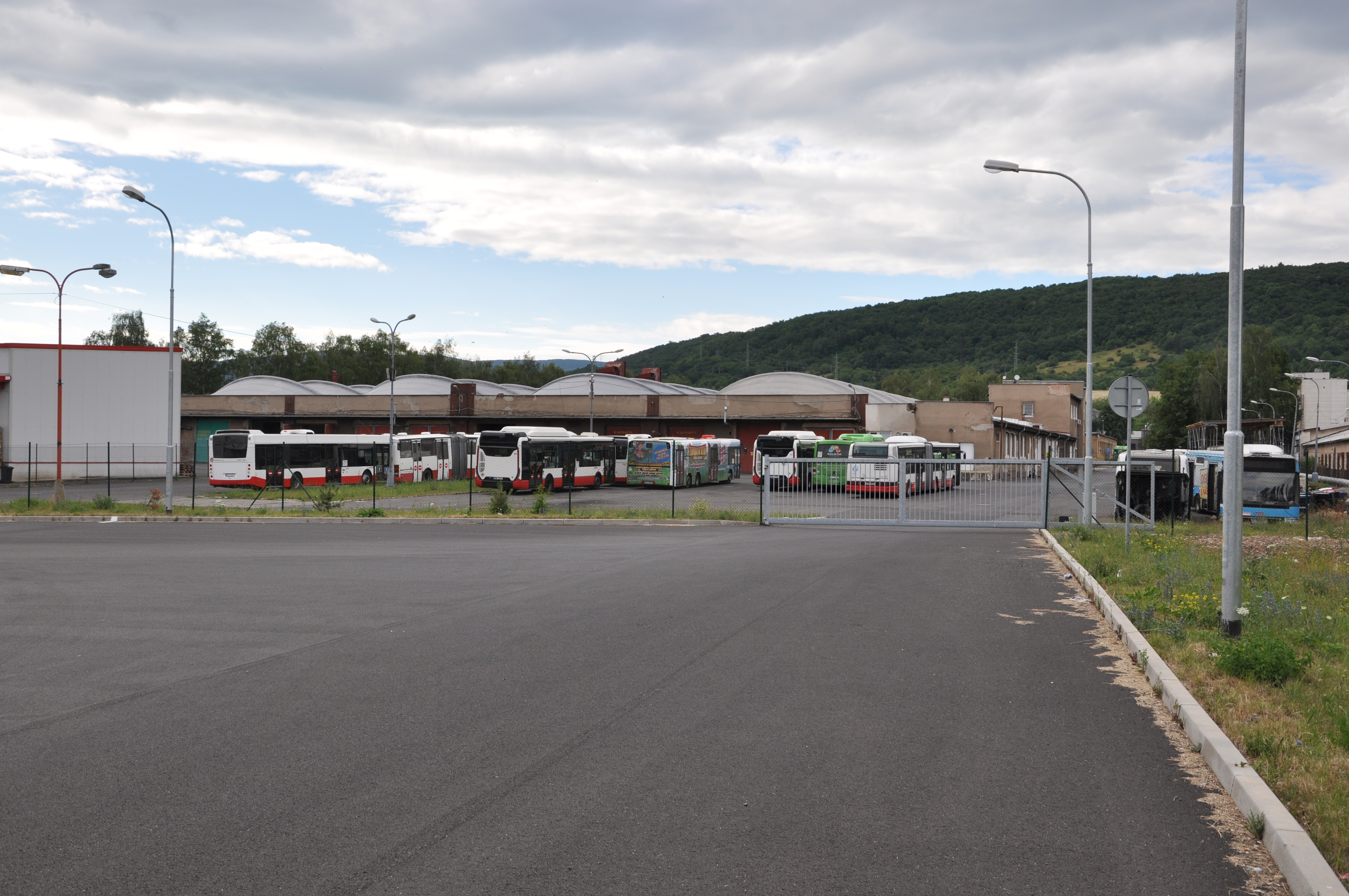 Betriebshof Předlice der Verkehrsbetriebe Ústí nad Labem, Tschechien. Die Anlagen wurden 1953 als Depot für die Straßenbahn in Betrieb genommen und nach deren Betriebseinstellung 1970 weiter als Depot für die städtischen Autobusse genutzt.